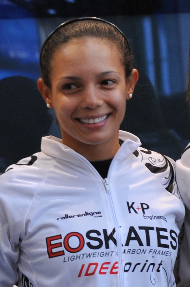 Cecilia Baena Guyader bei der Teampräsentation des German Inline Cup in Berlin